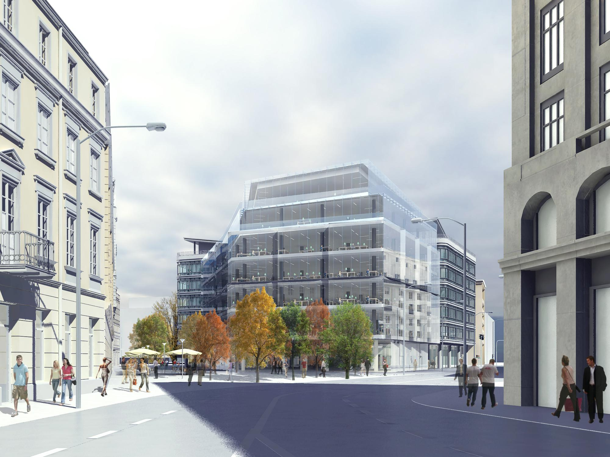 Rozbudowa i przebudowa Domu Towarowego SMYK - dawniej Cedet w Warszawie